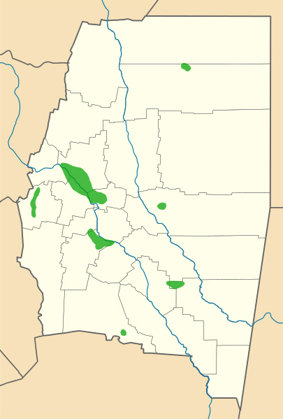 La Cultura Averías se desarrolló entre el año 1200 y el 1500 aproximadamente en la provincia argentina de Santiago del Estero.